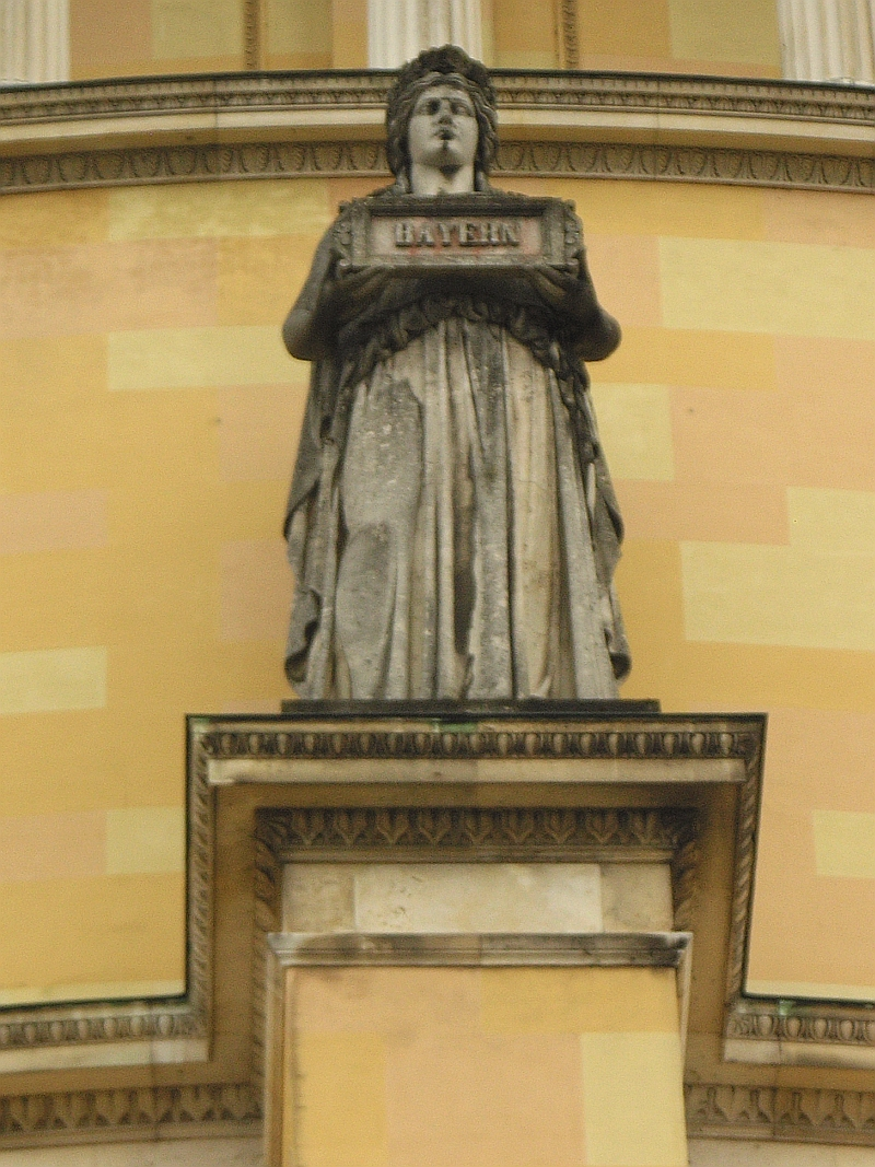 Diese Statue an der Aussenseite der Befreiungshalle in Kelheim steht für den Volksstamm der Bayern, Höhe der Statue 580 cm. Sie ist eine von 18 Statuen, die nach Modellen des Bildhauers Johann Halbig geschaffen wurden.